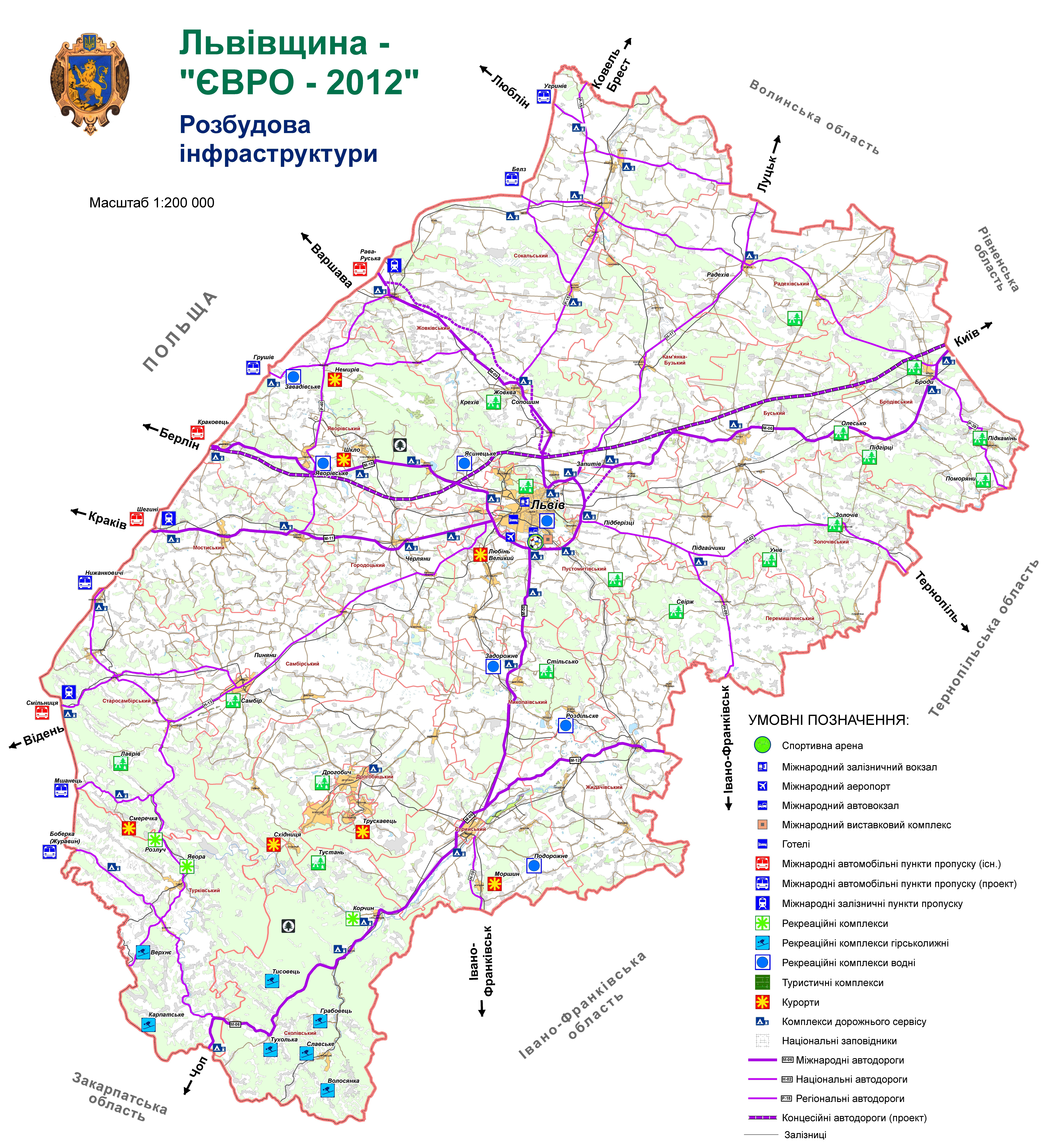 План розвитку інфраструктури Львівщини затверджений Степаном Лукашиком